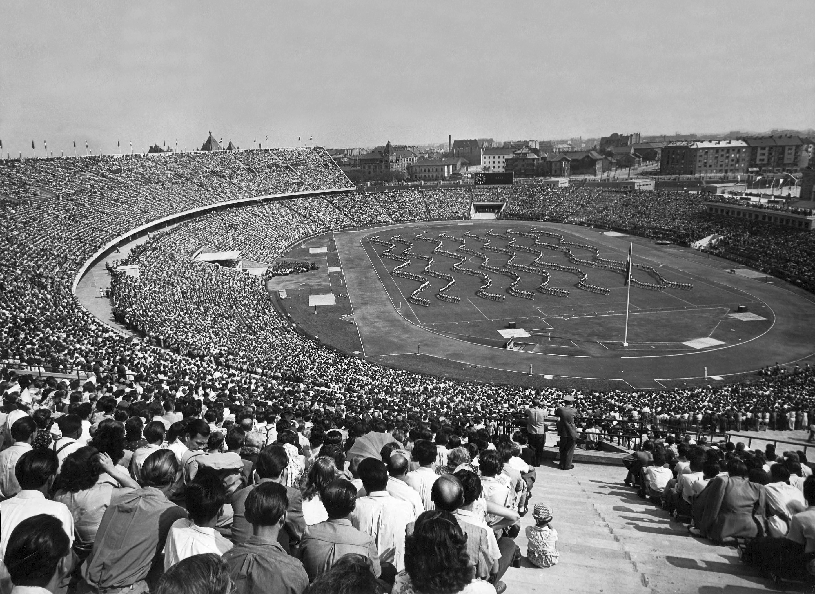 a megnyitás napján, 1953. augusztus 20-án. Location: Hungary, Budapest XIV., Népstadion Tags: stadium, Budapest Title: a megnyitás napján, 1953. augusztus 20-án.